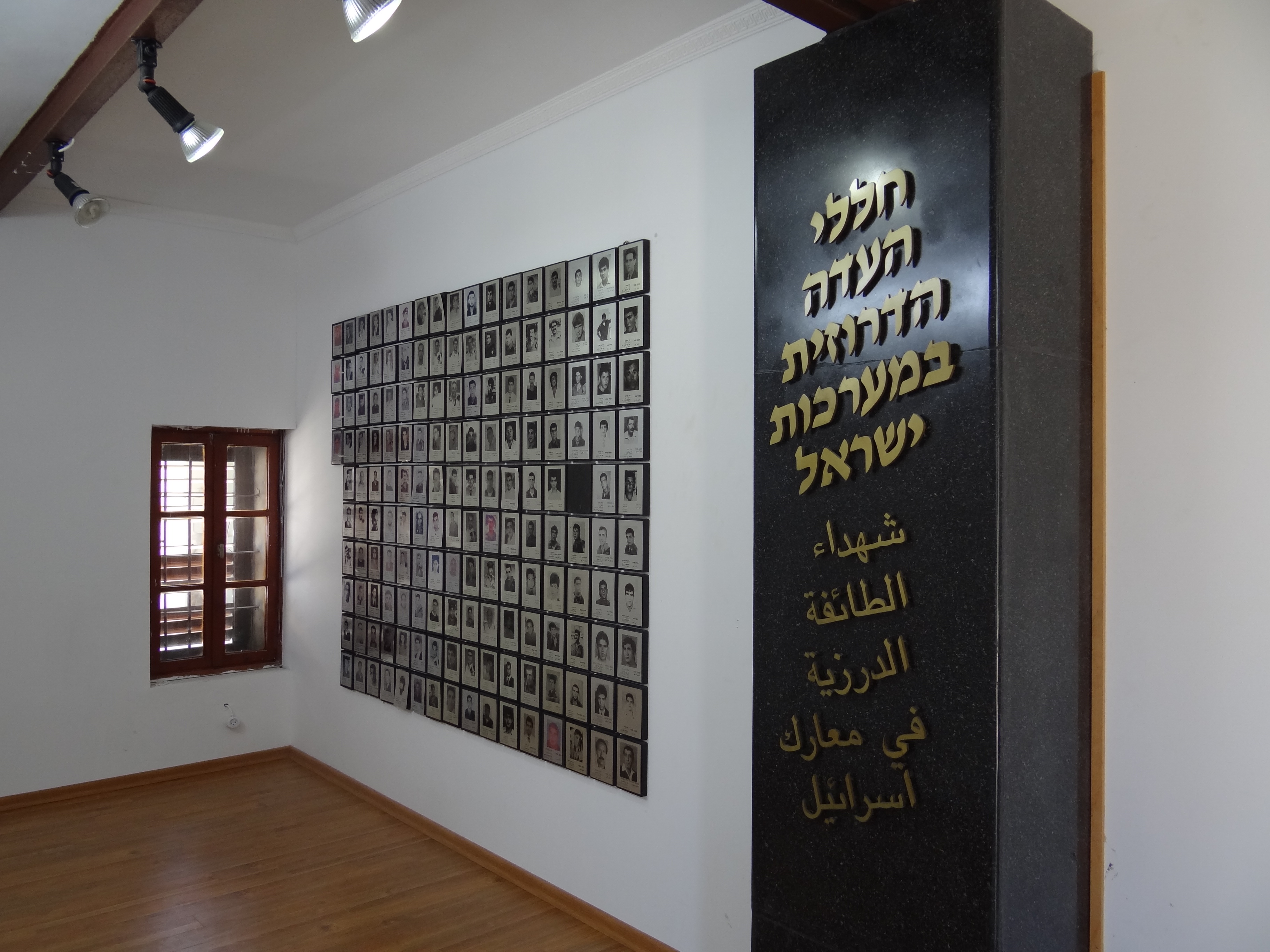 בית אוליפנט בדליית אל כרמל חדר הנצחת החללים הדרוזים במלחמות ישראל